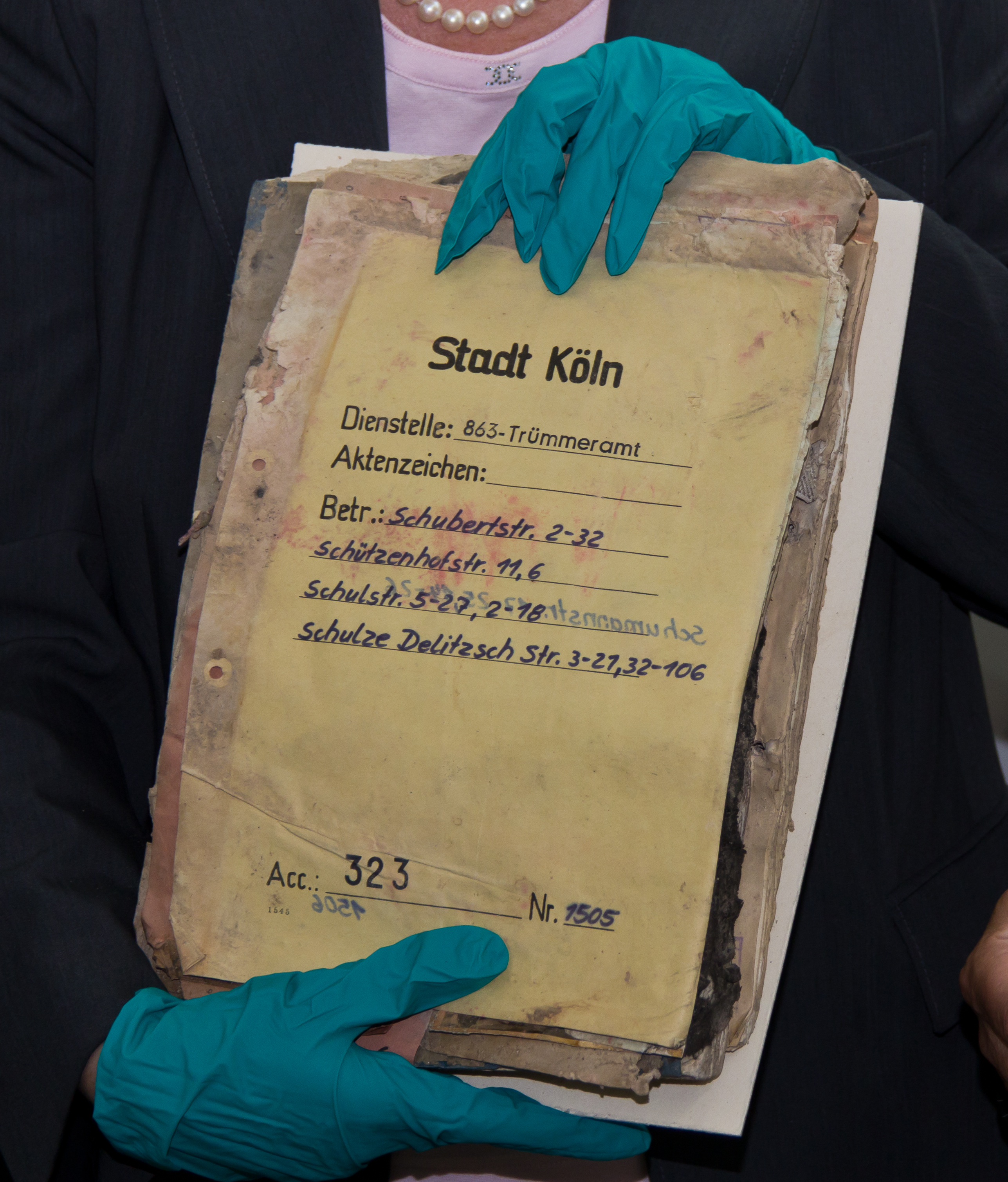 Pressetermin zur Inbetriebnahme der Gefriertrocknungsanlage im Restaurierungs- und Digitalisierungszentrum des Historischen Archiv der Stadt Köln. Dr. Bettina Schmidt-Czaia hält eine gefriergetrocknete Akte der Dienststelle „863-Trümmeramt“ in den Händen